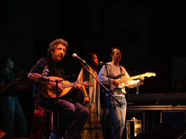 Eugenio Bennato in concerto ad Atripalda (Campania)